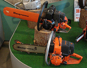 Husqvarna Viking chainsaws. Photo taken at the Husqvarna Museum, Huskvarna, Sweden.